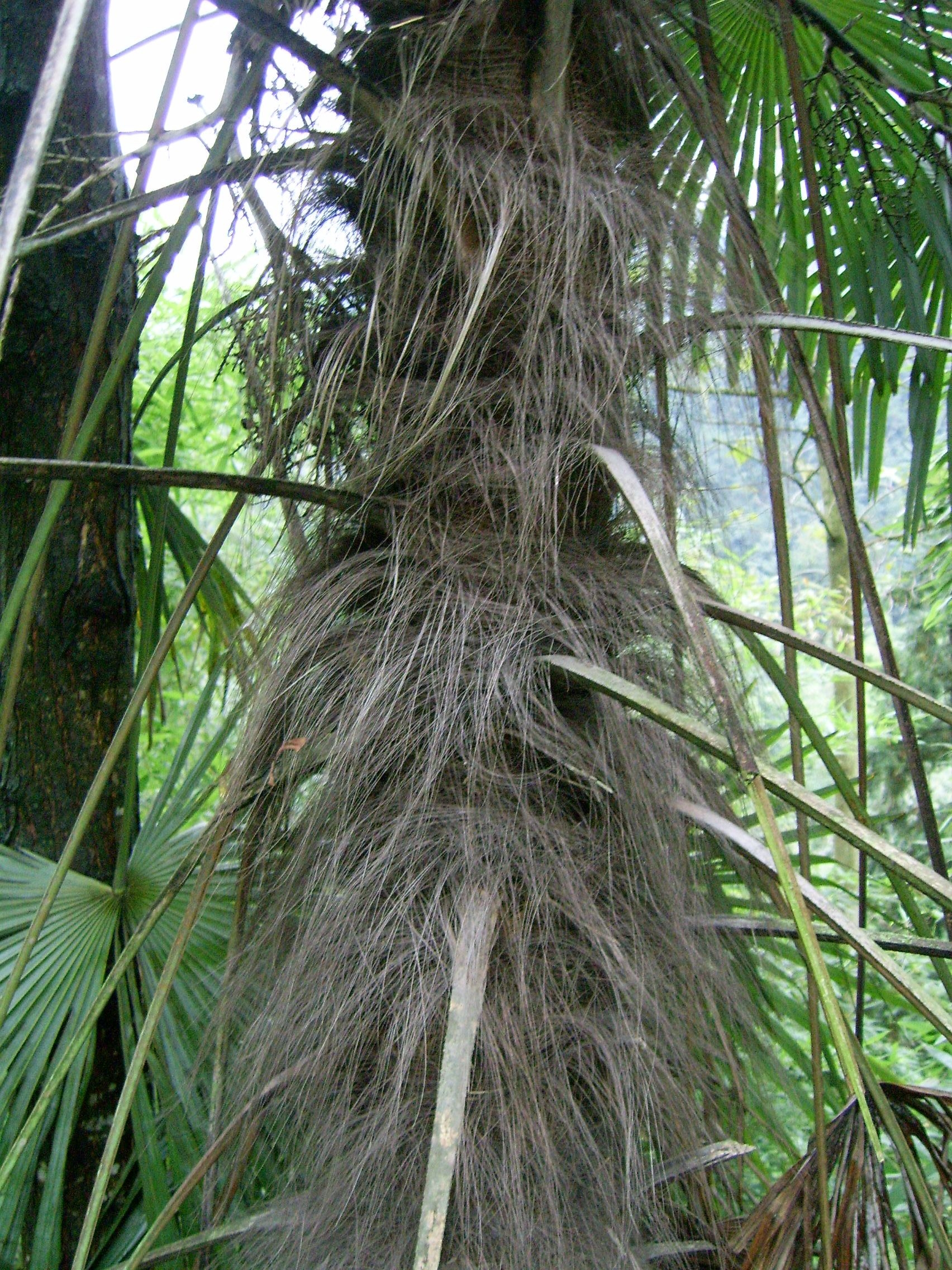 棕榈树的树干。2005年摄于诸暨乡间。